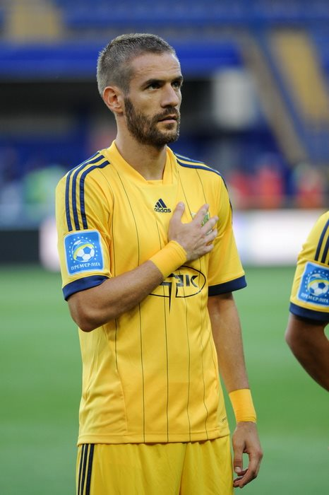 Металлист 1:0 Металлург Д